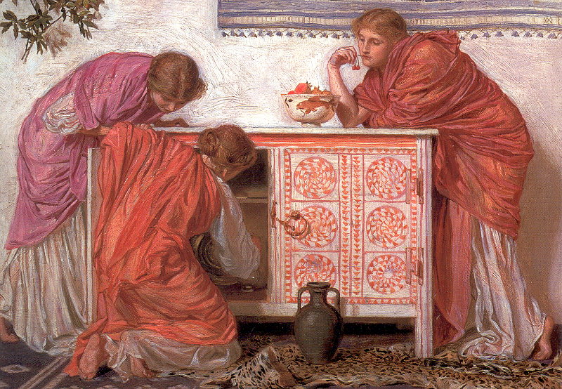 Pomegranates